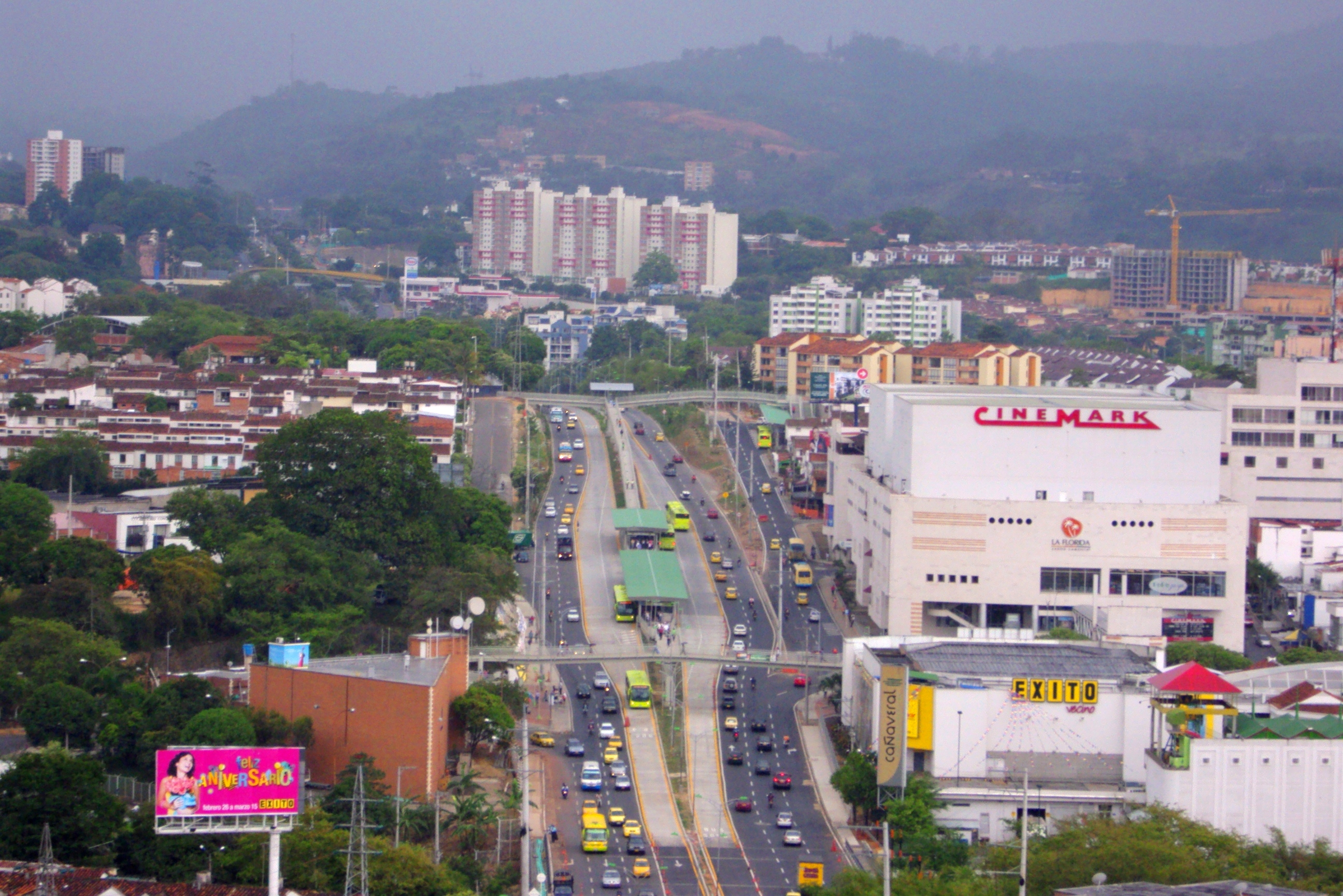 Troncal Metrolinea Autopista Floridablanca a la altura de Cañaveral